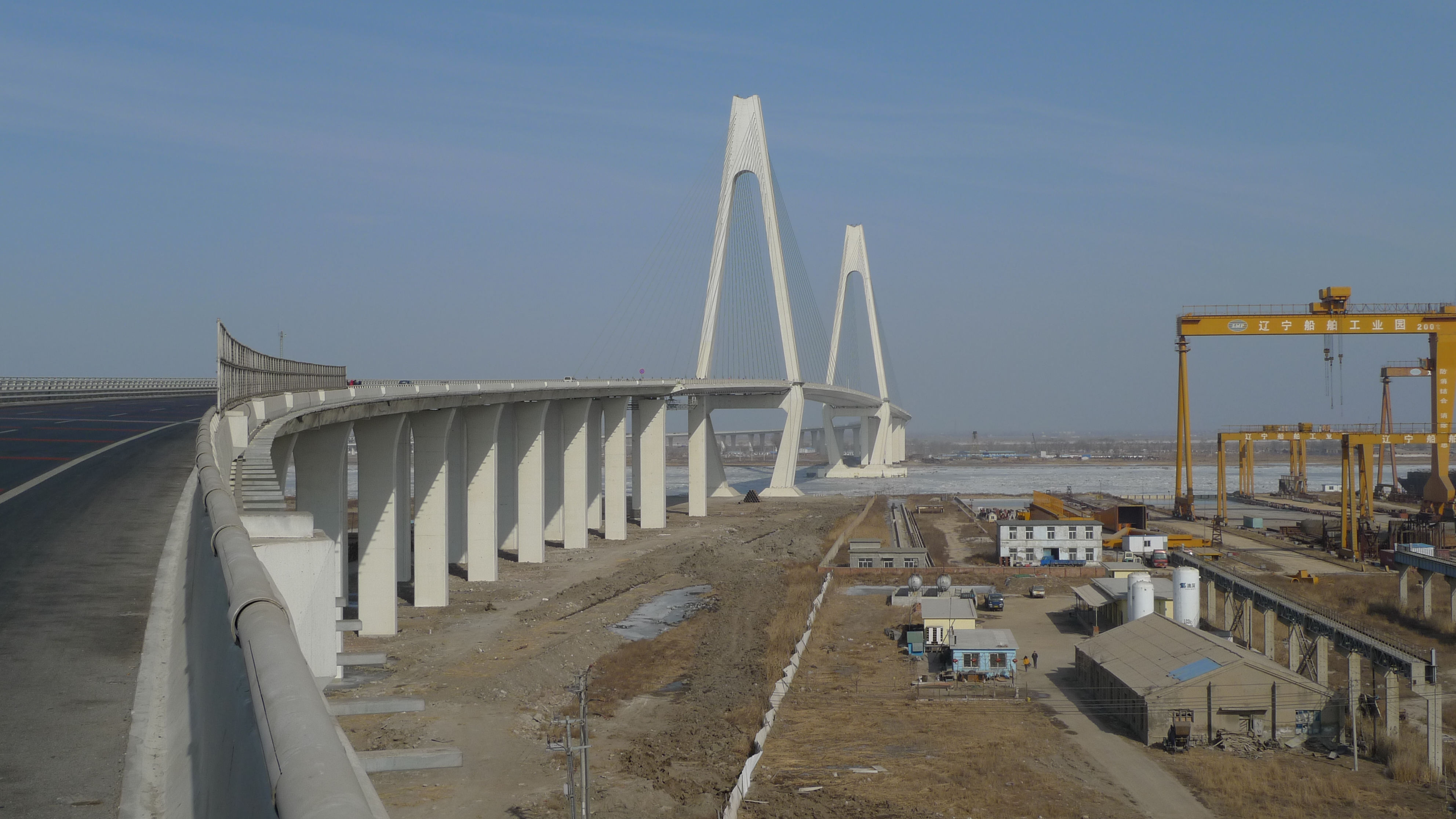 营口辽河大桥